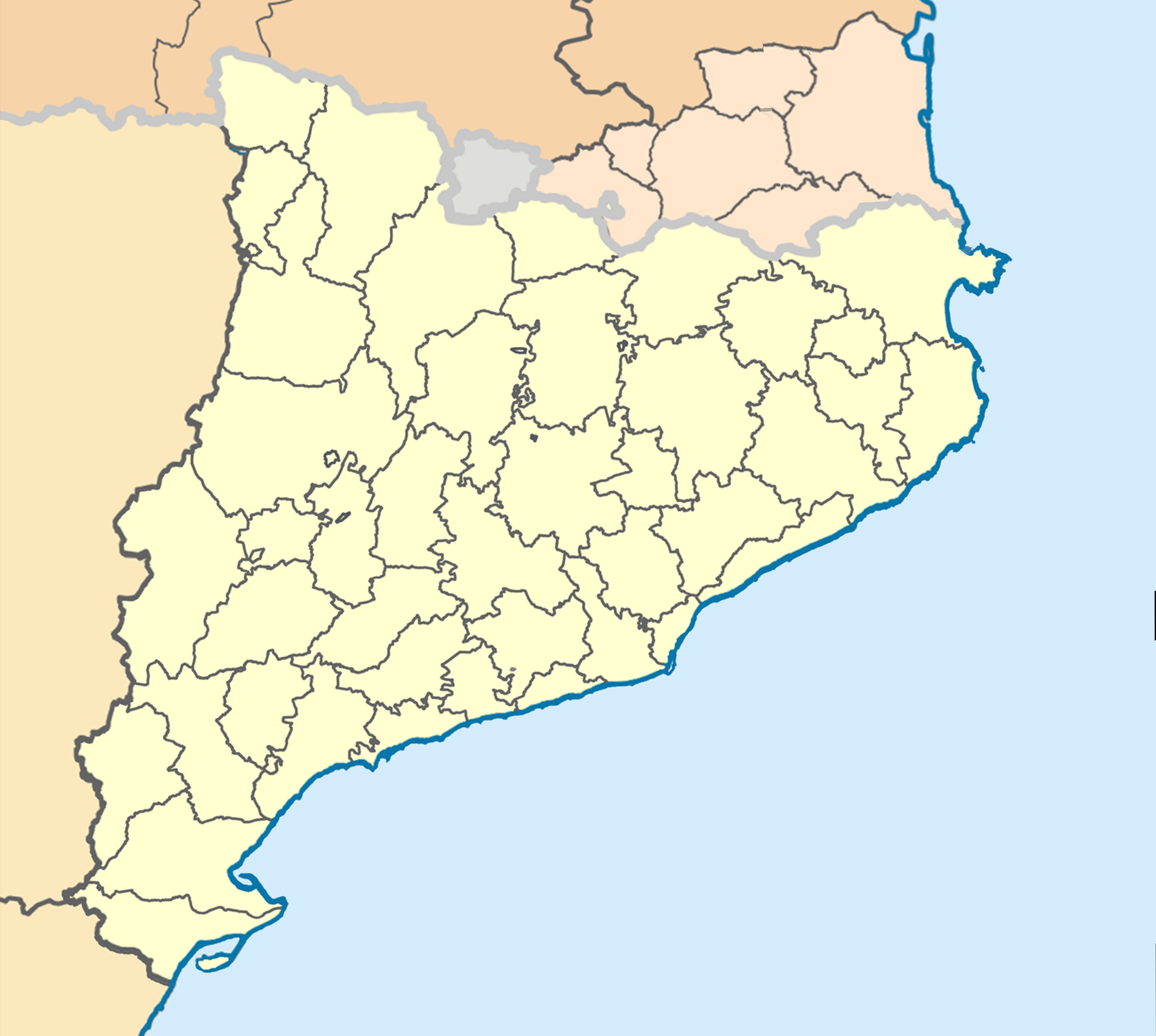 Comarques de la Catalunya Nord segons el Nomenclàtor toponímic de la Catalunya del Nord, i comarques oficials de la Comunitat Autònoma de Catalunya.